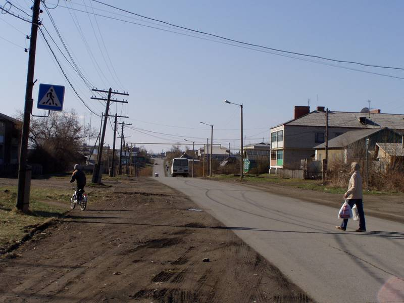 Центр села со стороны ост. Совхозная